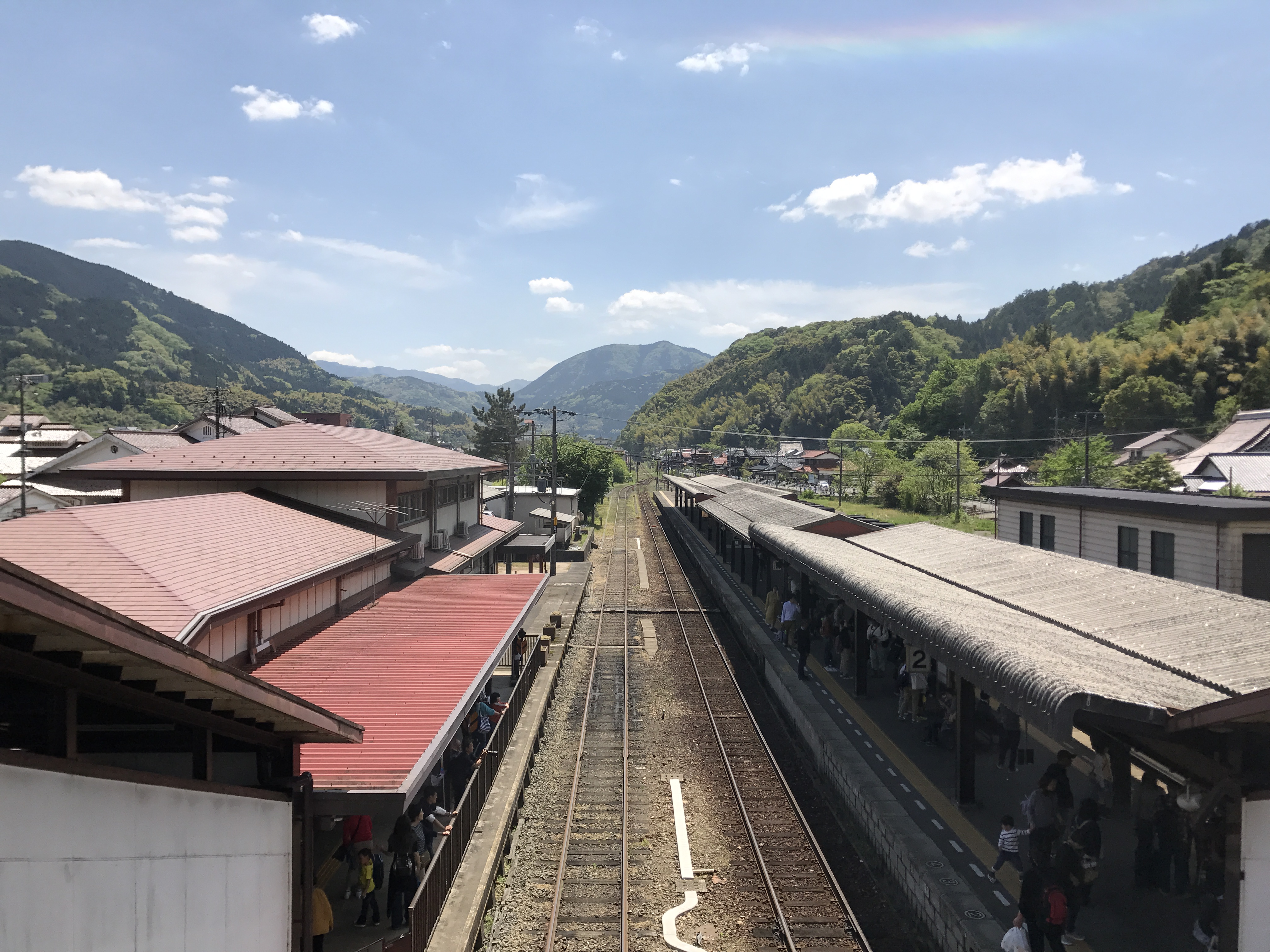 津和野駅の跨線橋より望む山口線・船平山方面